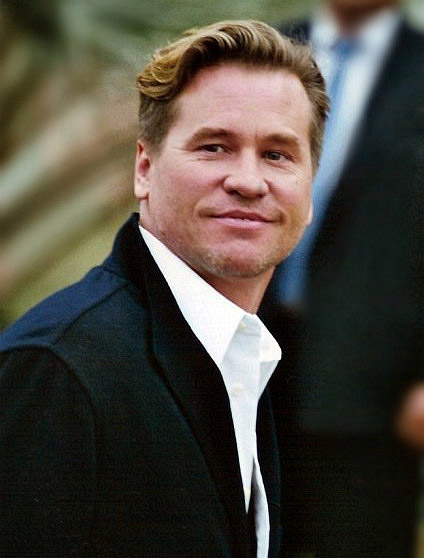 Val Kilmer au festival de Cannes